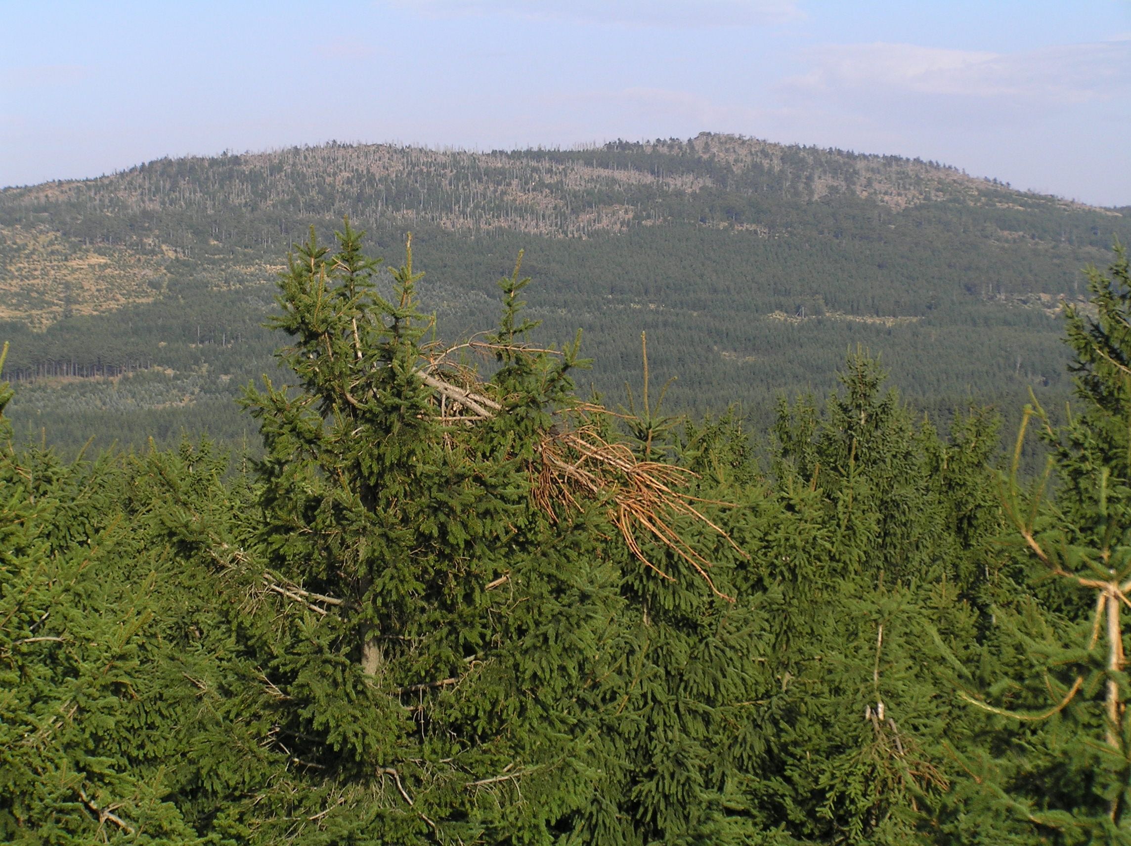 Holubník (1071 m) z Olivetské hory